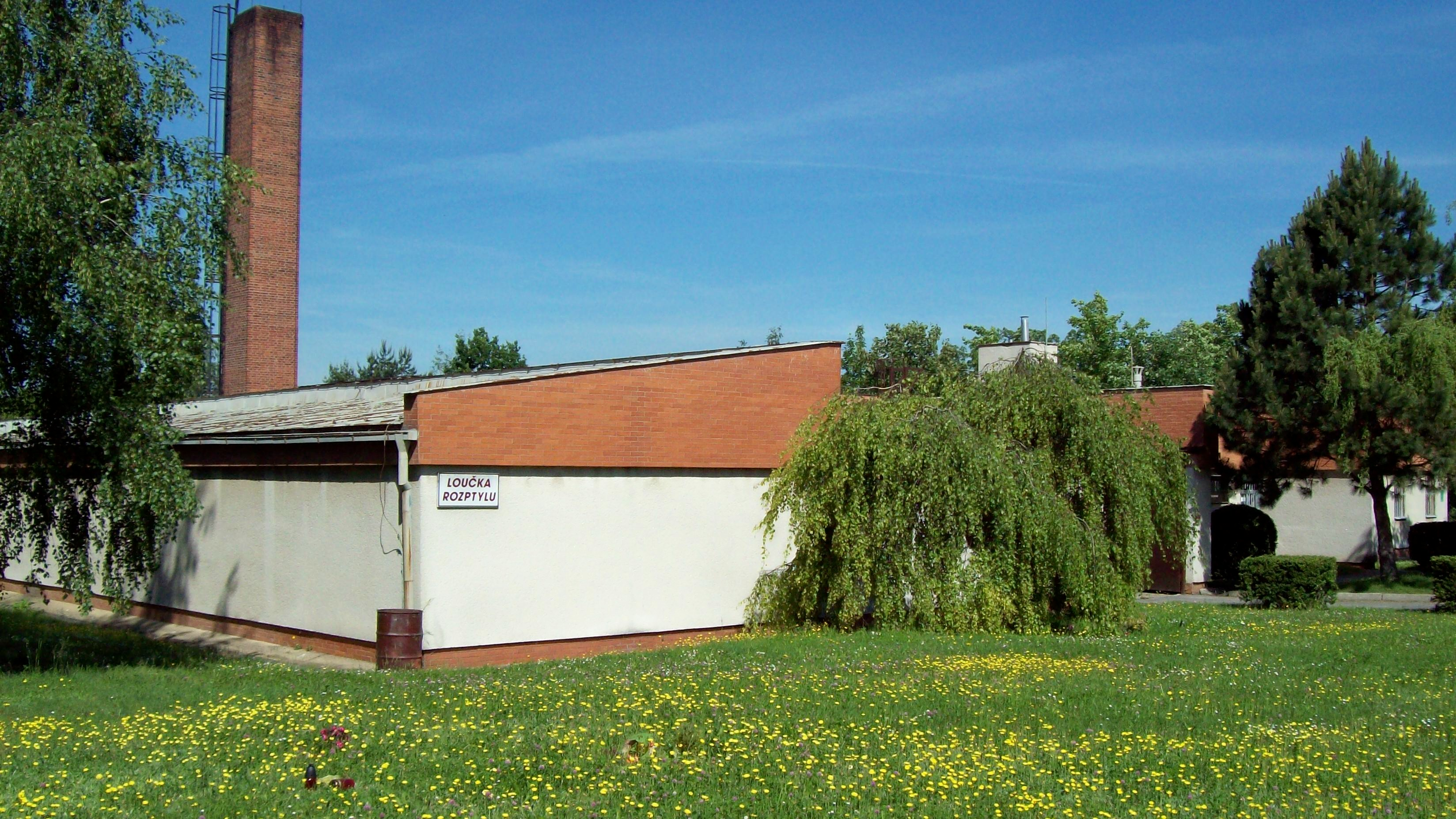 Krematorium Mělník, v sousedství hřbitova Na Ráji.